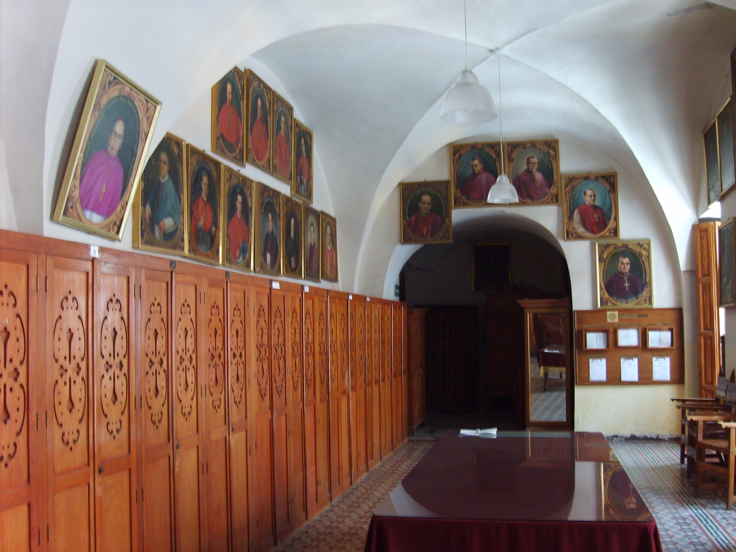 La Notaría para las confirmaciones, Catedral de Puebla.